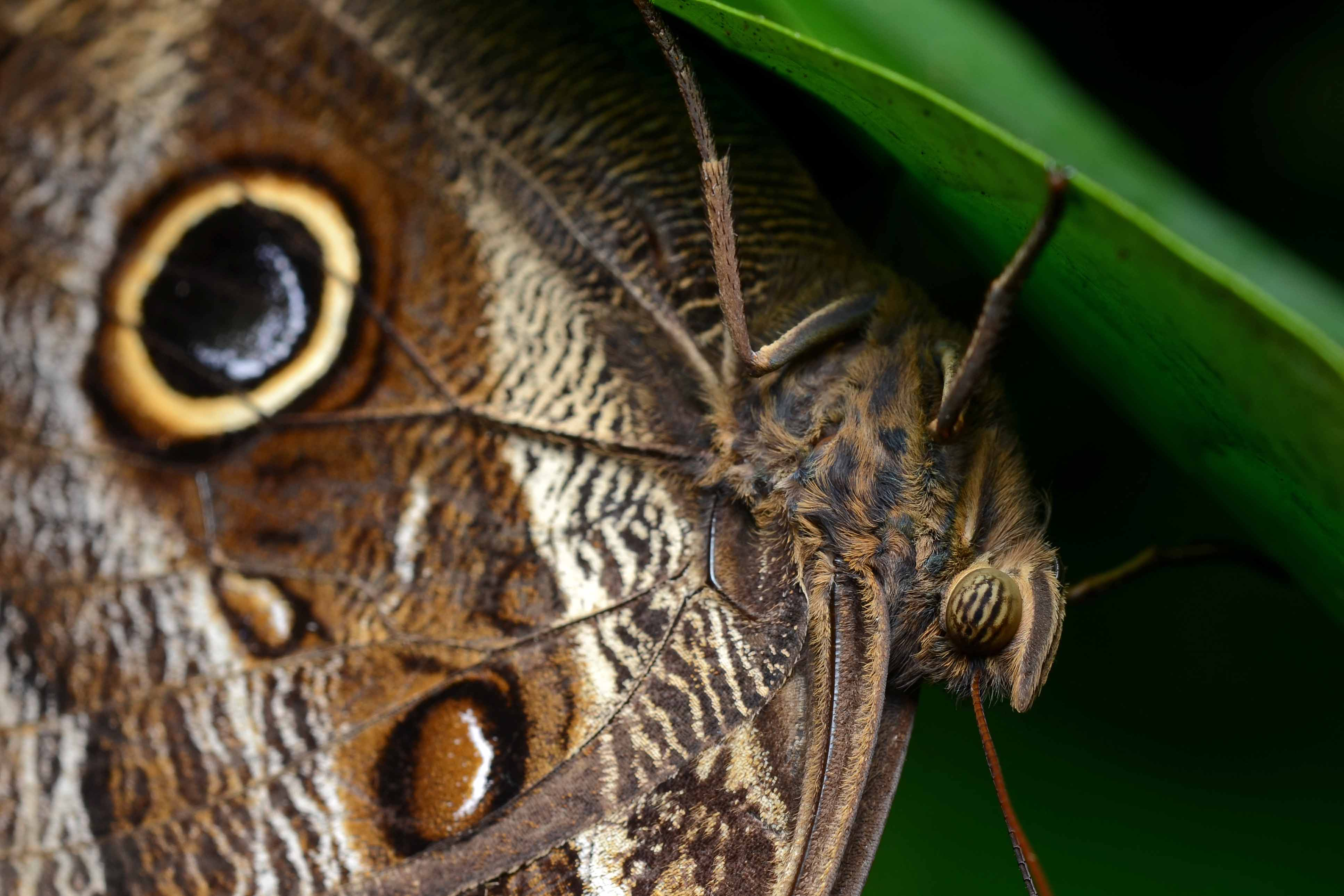 seen roosting nr. Moyobamba seen nr. Moyobamba, Peru